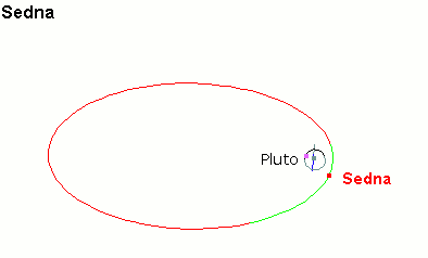 Bahnvergleich Sedna-Pluto Der grüne Abschnitt der Teil der Bahn kennzeichnet den Bereich, der südlich der Ekliptik liegt. Die beiden Linien an der Sonne entsprechen den perspektivisch verkürzten Koordinatenlinien zum ekliptikalen Nordpol und zur Richtung des Frühlingspunktes.